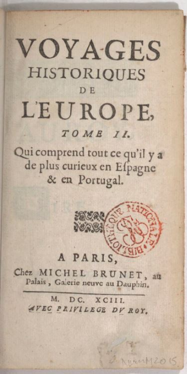 Couverture du tome 2 du livre Voyages historiques de l'Europe par Claude Jordan (vers 1659 - vers 1727), ouvrage de 8 volumes (Gallica)